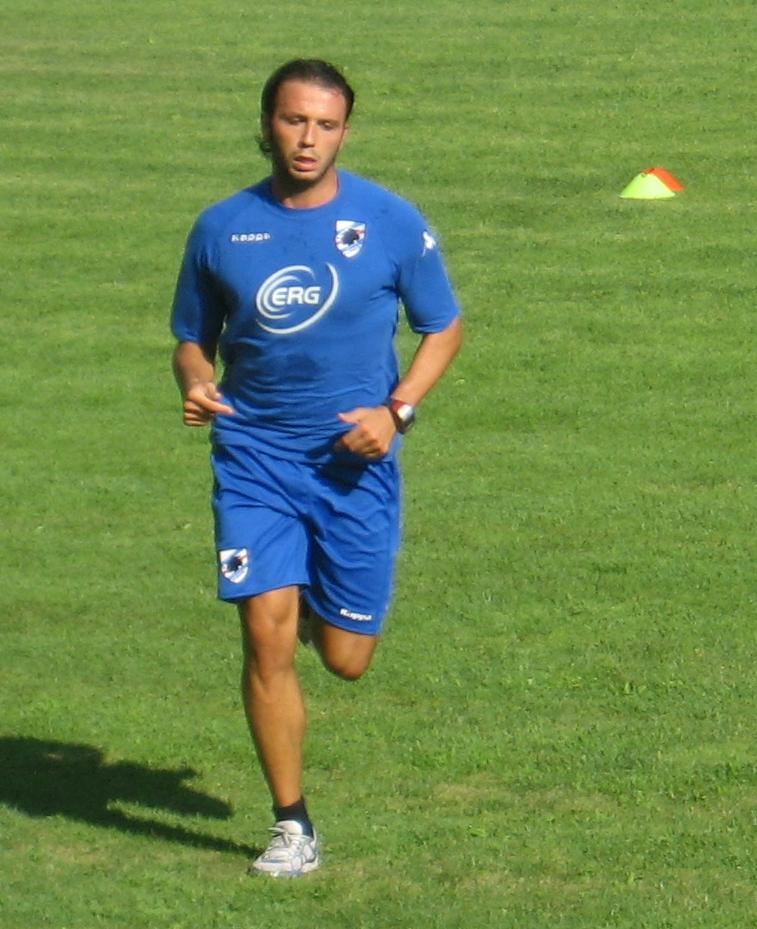 Il calciatore Giampaolo Pazzini in allenamneto con la Sampdoria